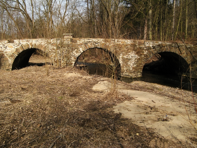 Silniční most, Vlčí Důl, Zásmuky.